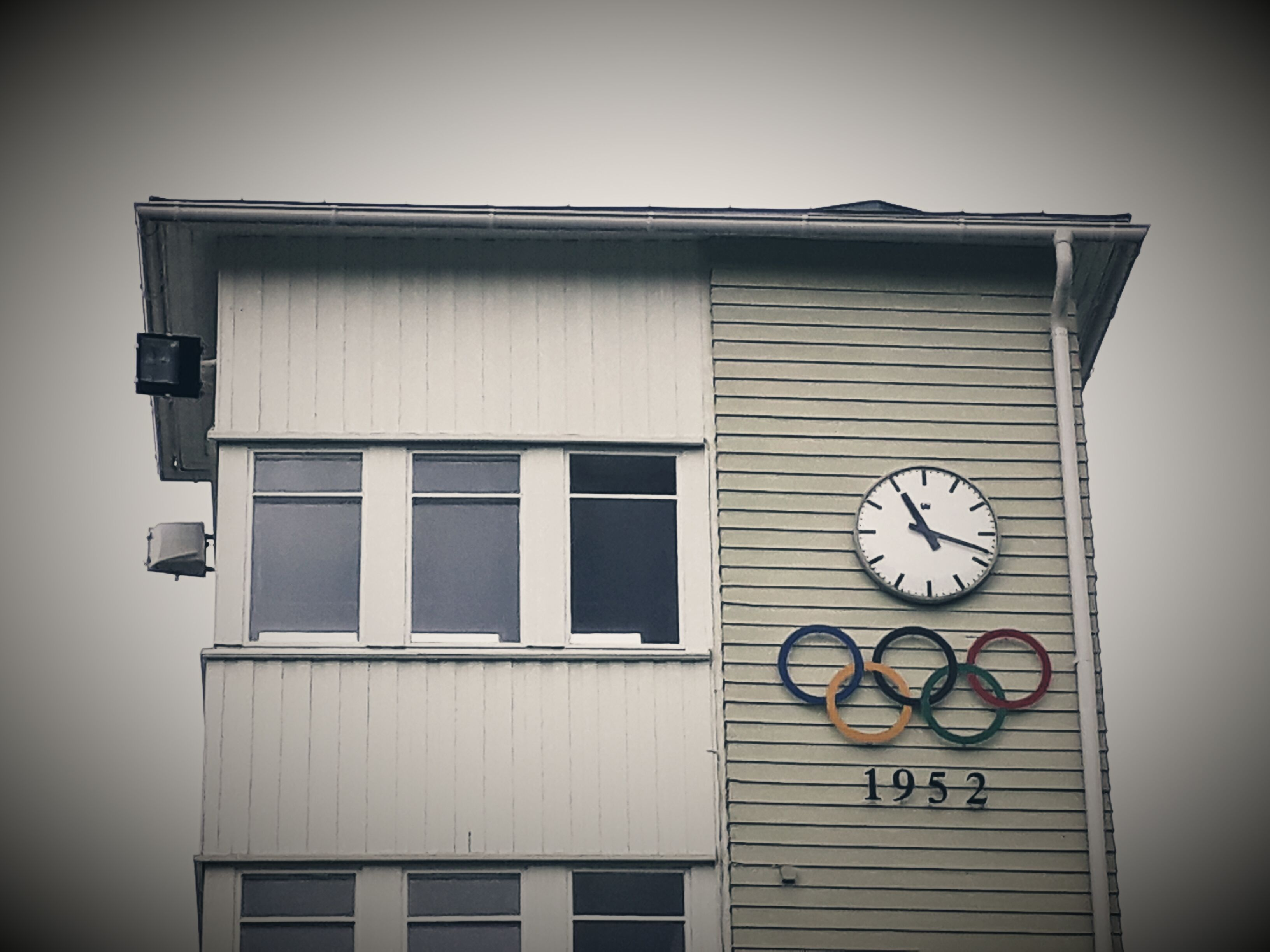 Ahveniston maauimala; maauimala Hämeenlinnassa